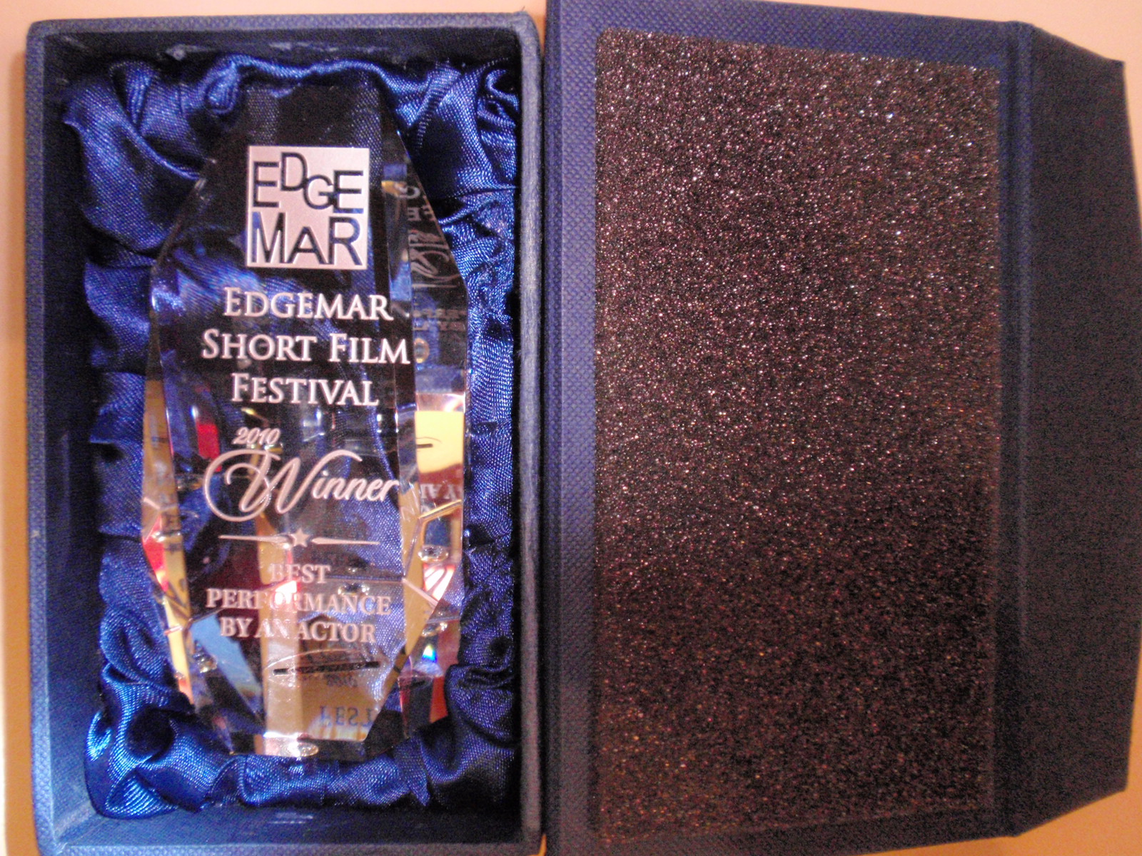 Cena pro nejlepšího herce festivalu Edgemar Short Film Festival 2010 za roli Petra ve filmu Mamánek